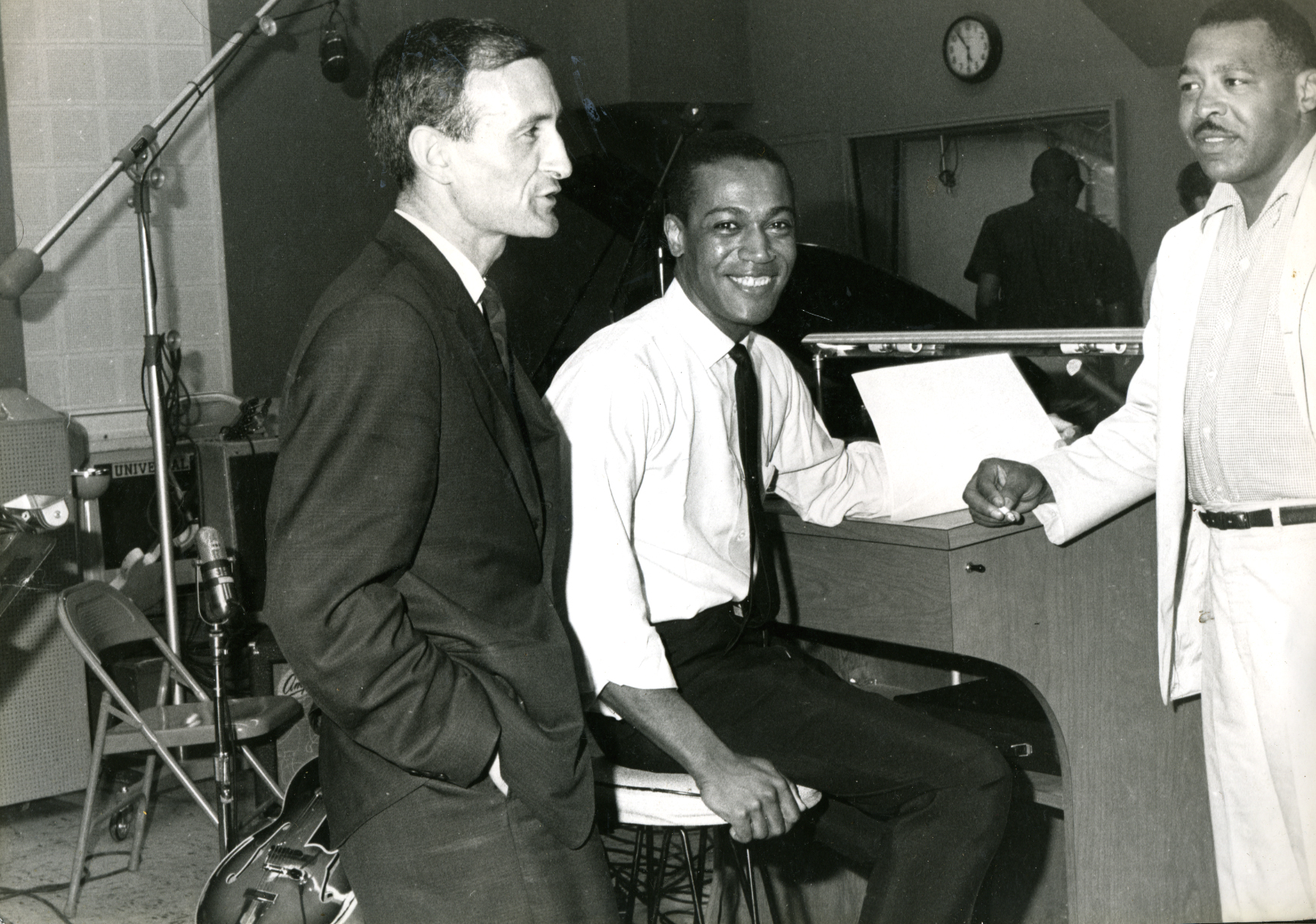 Pierre Jaubert in the Motown days